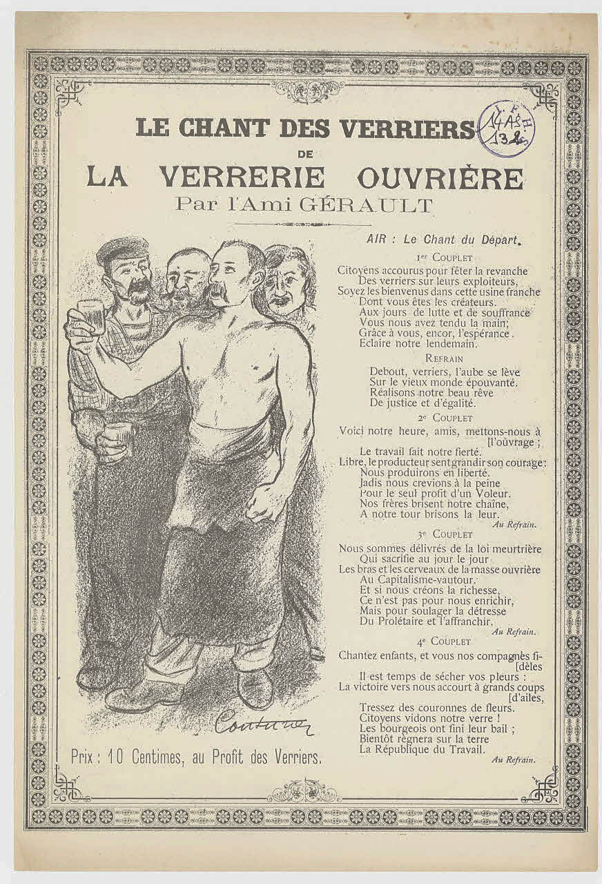 « Chant des verriers de la verrerie ouvrière par l’Ami Gérault ». Chanson écrite par Gérault-Richard et destinée à lever des fonds pour soutenir la grève des ouvriers de la Verrerie Sainte-Clotilde à Carmaux, 1896. Illustration : dessin d'Édouard Couturier